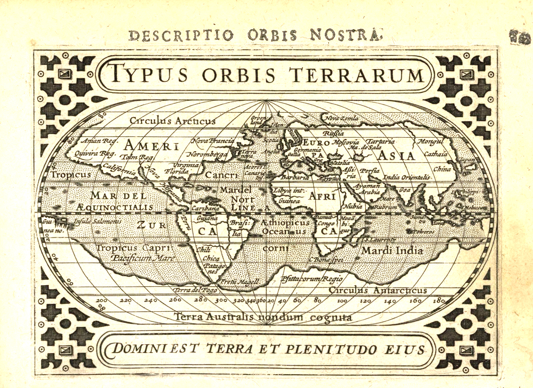 Wereldkaartje van Petrus Bertius